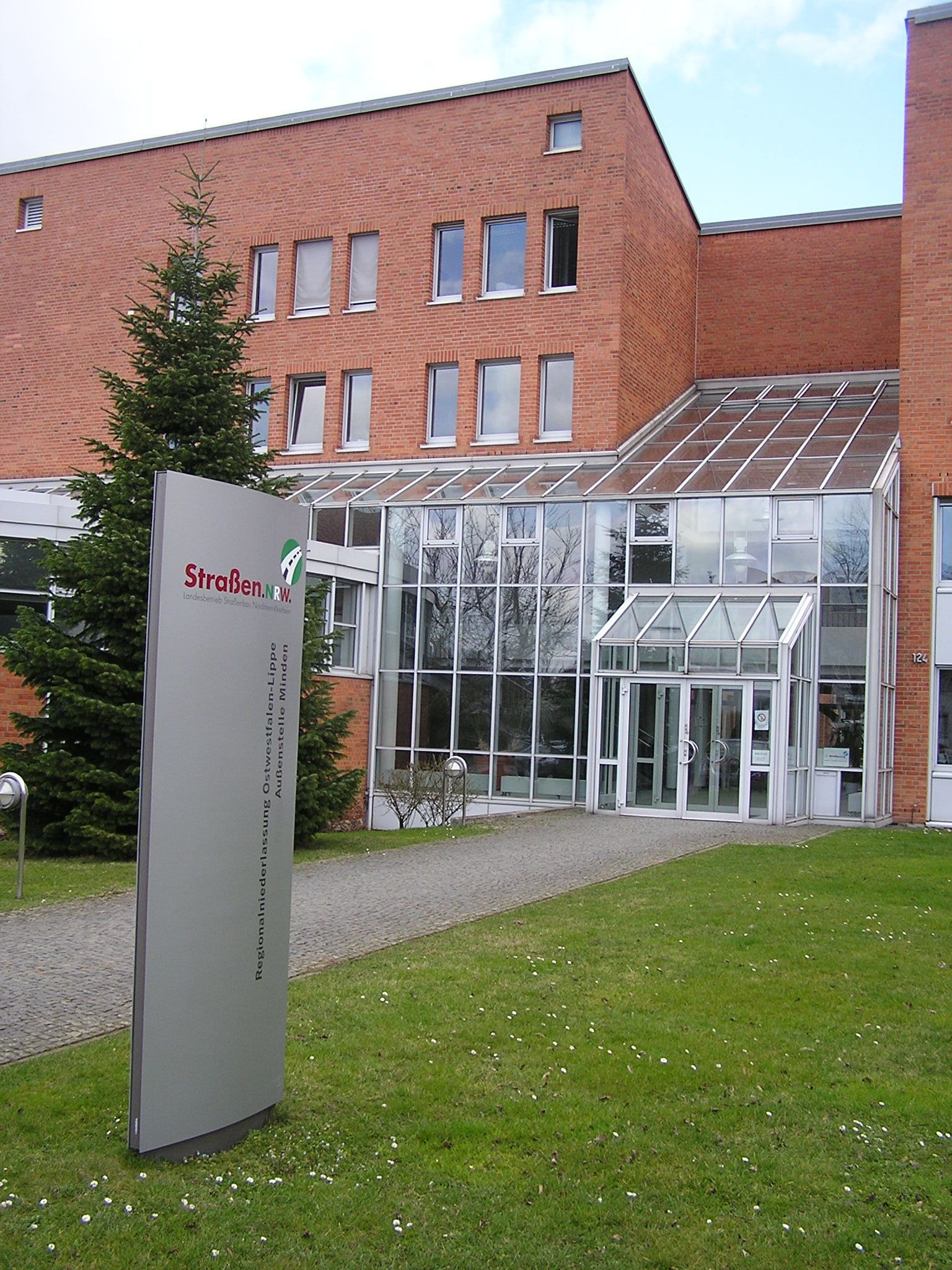 Bürokomplex der Außenstelle Straßen.NRW in Minden/Westf. Die Gebäude sind auf dem Gelände der ehemaligen Brauerei Feldschlösschen gebaut worden.